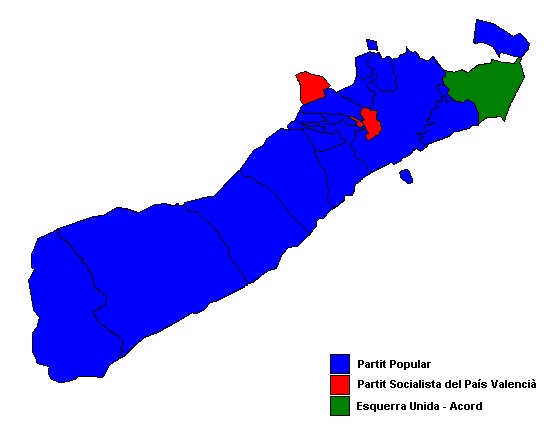 Partits polítics més votats als municipis de la Costera (País Valencià) després de les eleccions municipals de 2007.